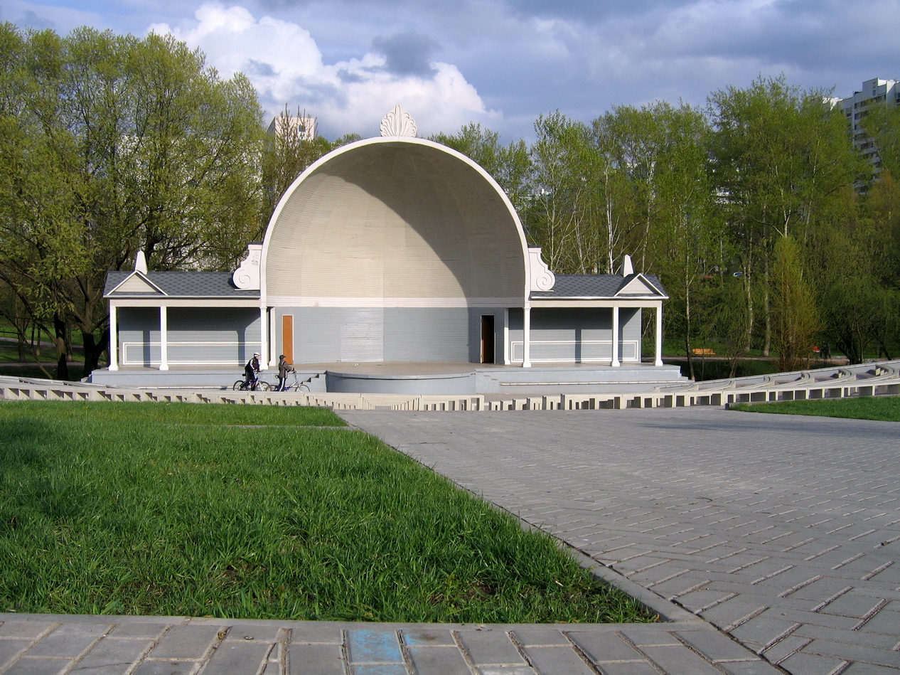 Певческое поле в Медведково. Москва